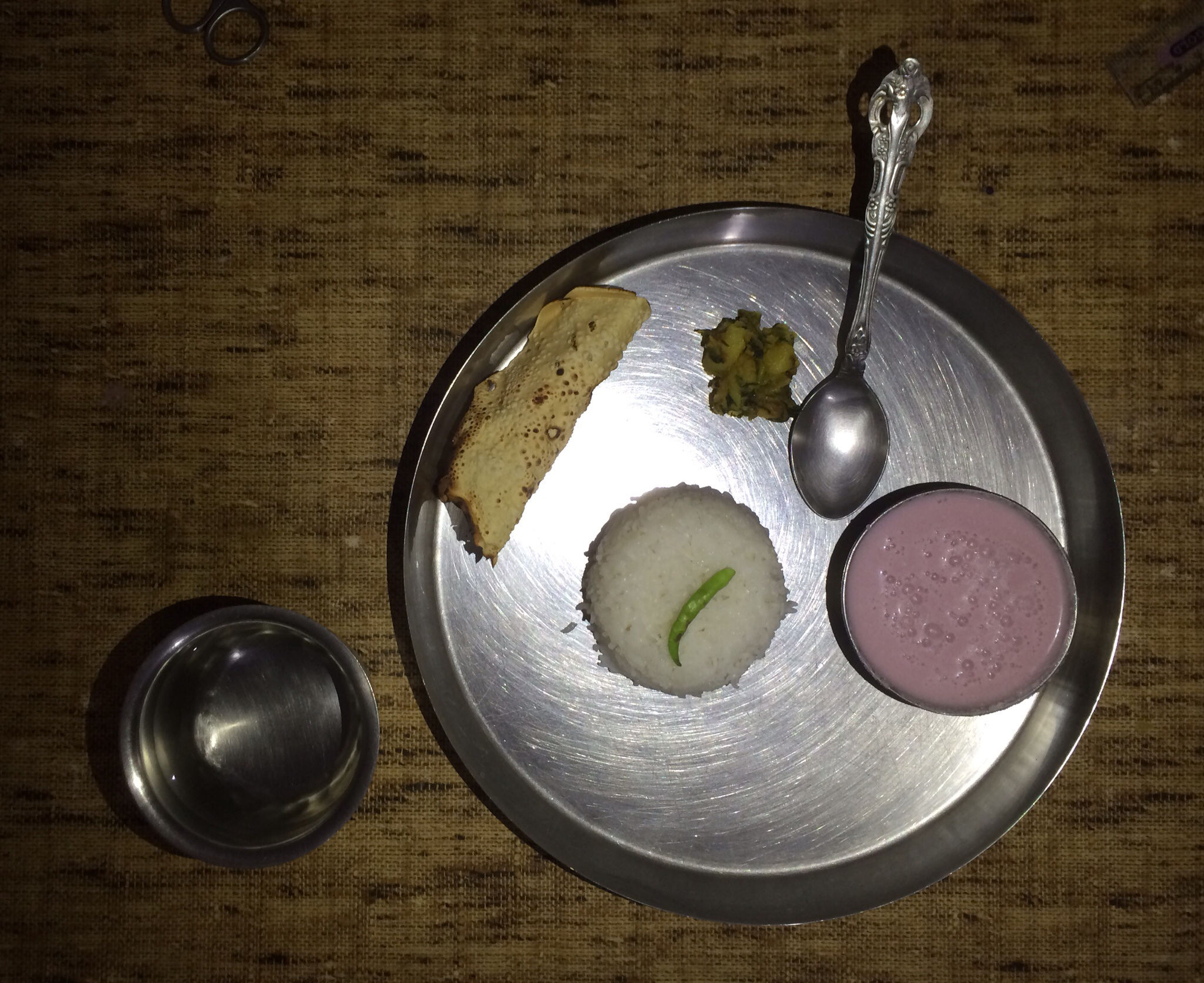 कोकमाचे सार अर्थात सेल कढी, भात, पापड